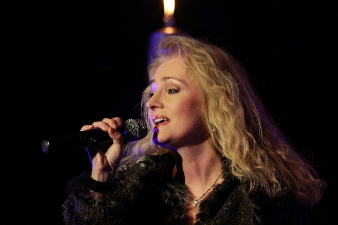 Nicole, Auftritt in Kusel, 2010